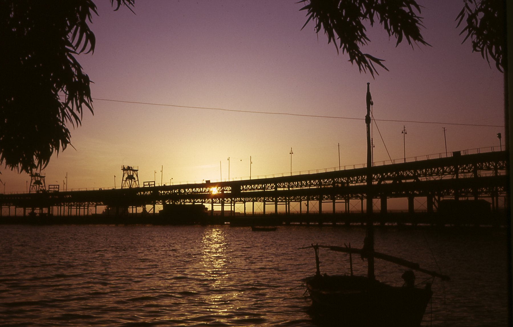 Muelle de mineral de la compañía Riotinto